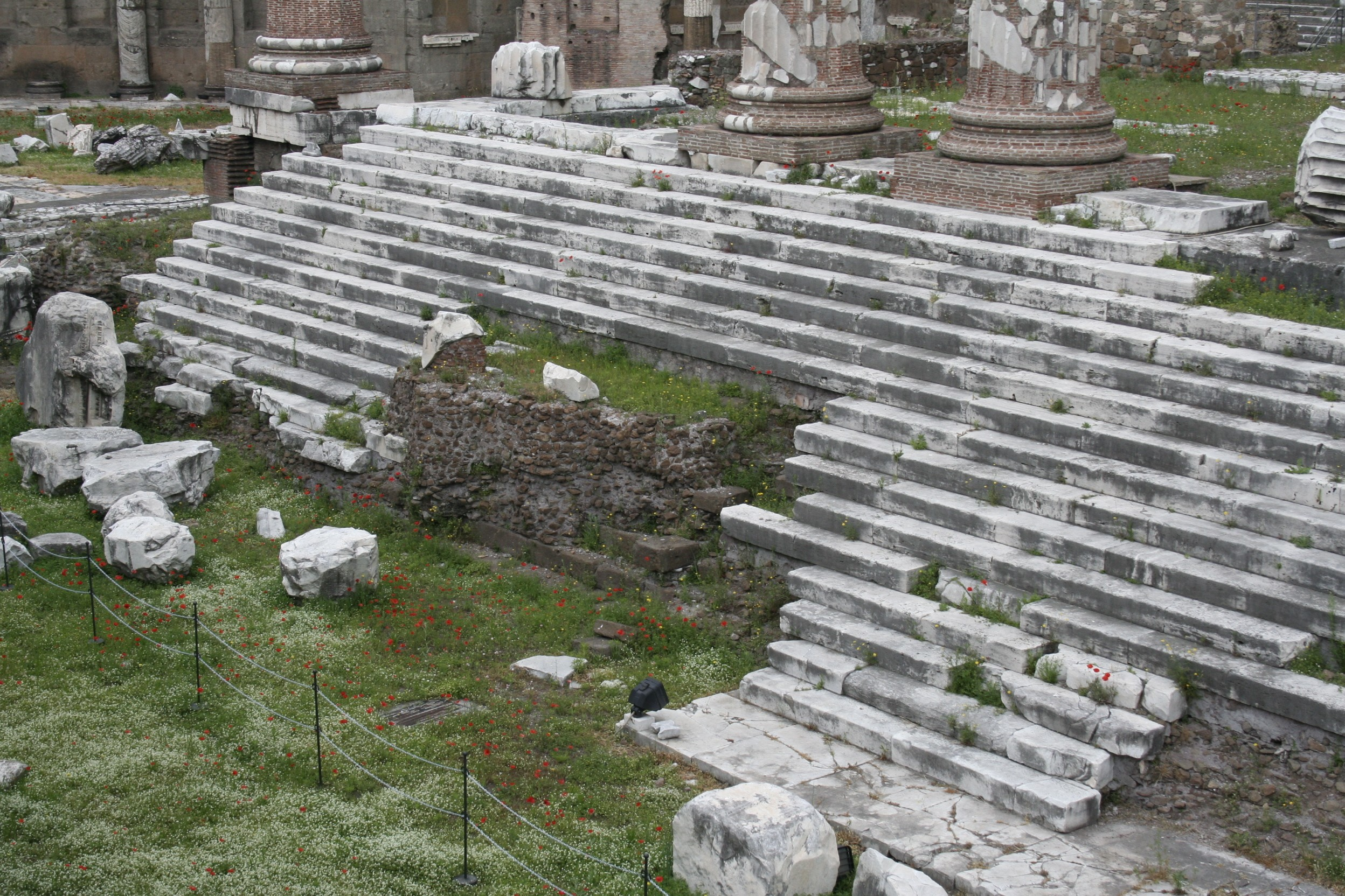 Escalier du temple de Mars Ultor, Forum d'Auguste.